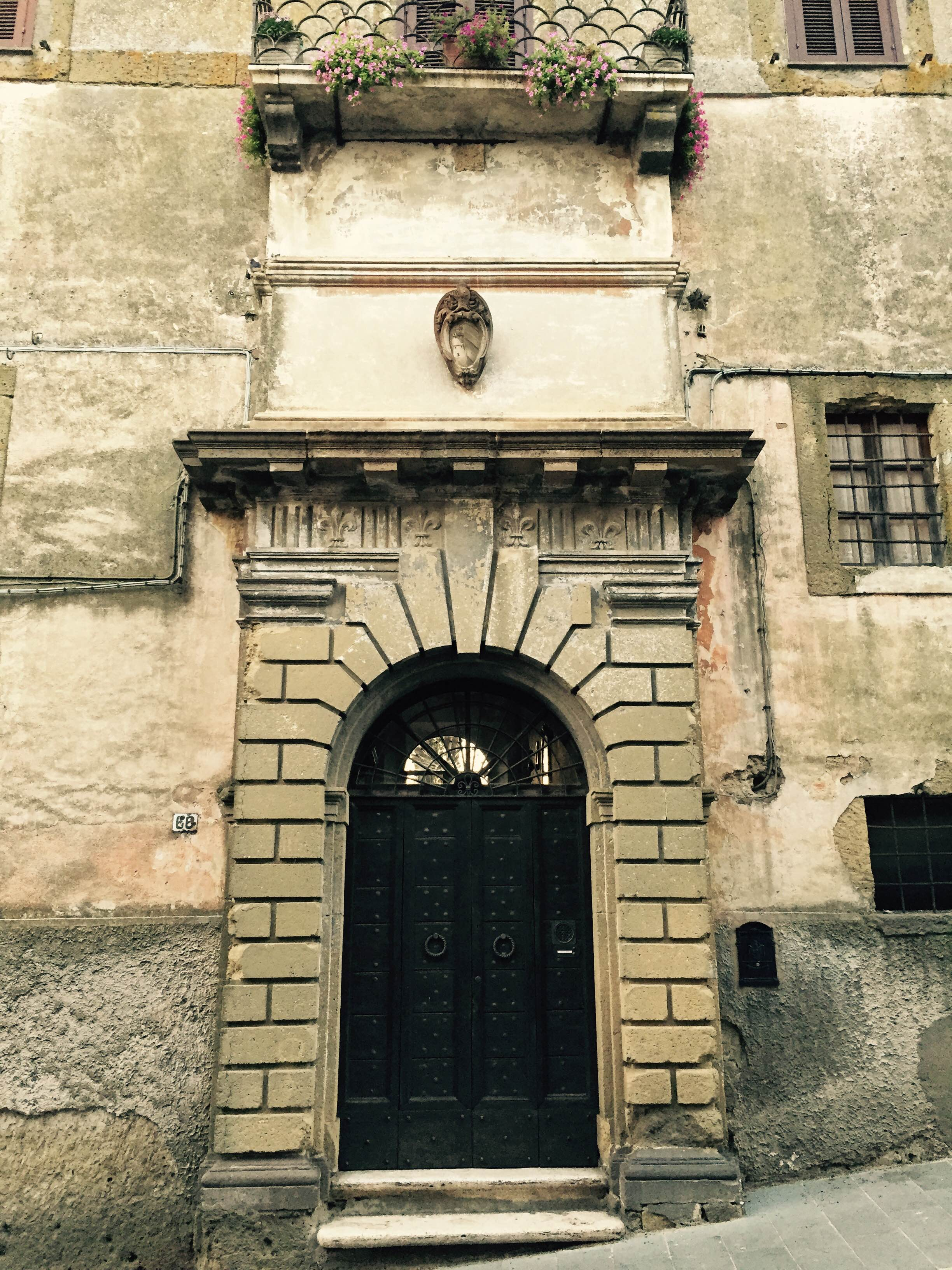 Palazzo Platoni Farnese